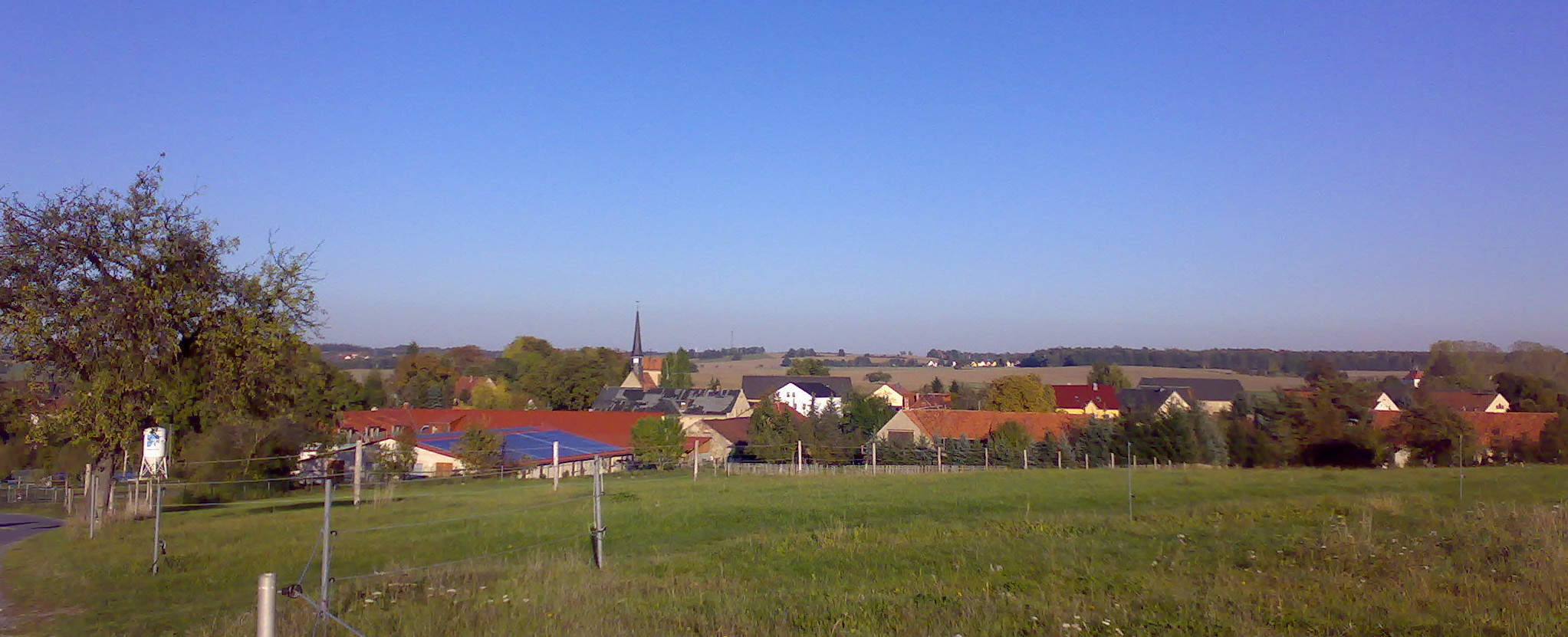 Langebrück Unterdorf Ortsansicht